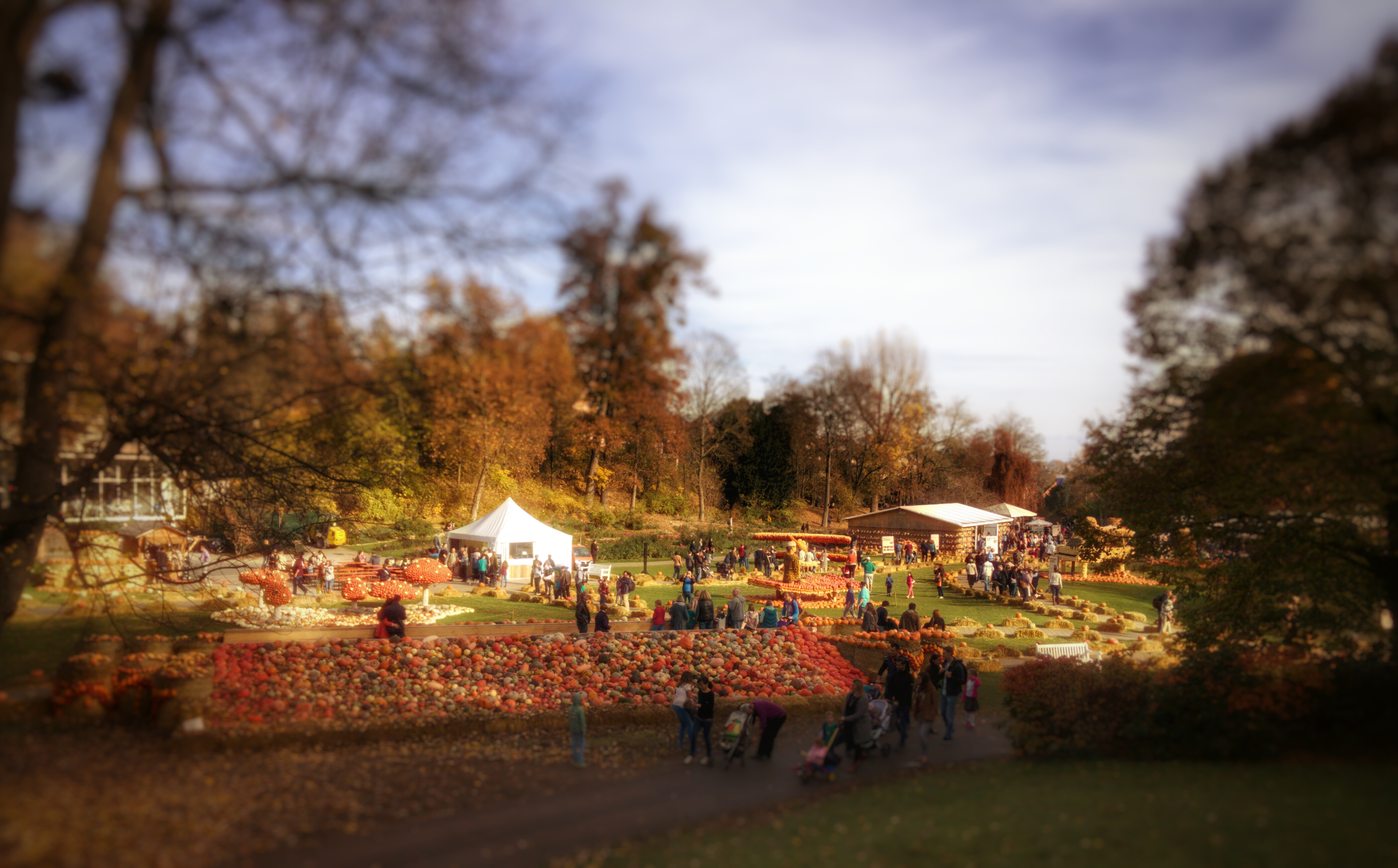 Kürbisausstellung mit vielen liebevoll erstellten Figuren